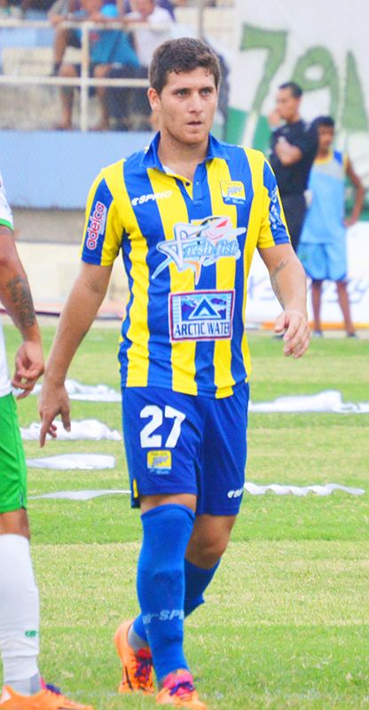 Francisco Silva en Clásico Manabita en 2014 con la camiseta de Delfín